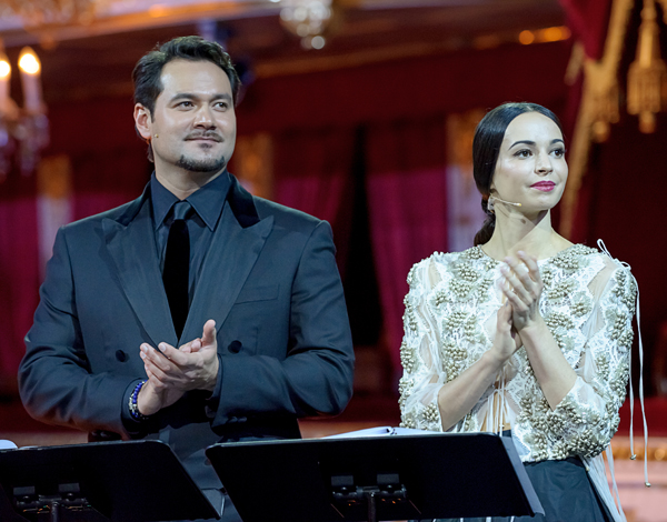 Ведущие церемонии - Ильдар Абдразаков и Диана Вишнева Фотограф Дмитрий Дубинский 2014